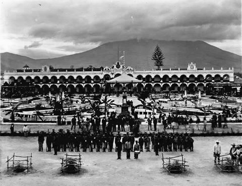 Parque Central de Antigua Guatemala en la década de 1920.